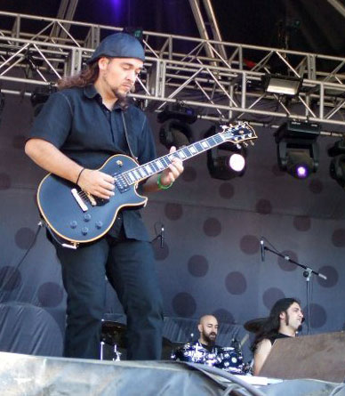 Avalanch tocando en el Festival En Vivo 2010.